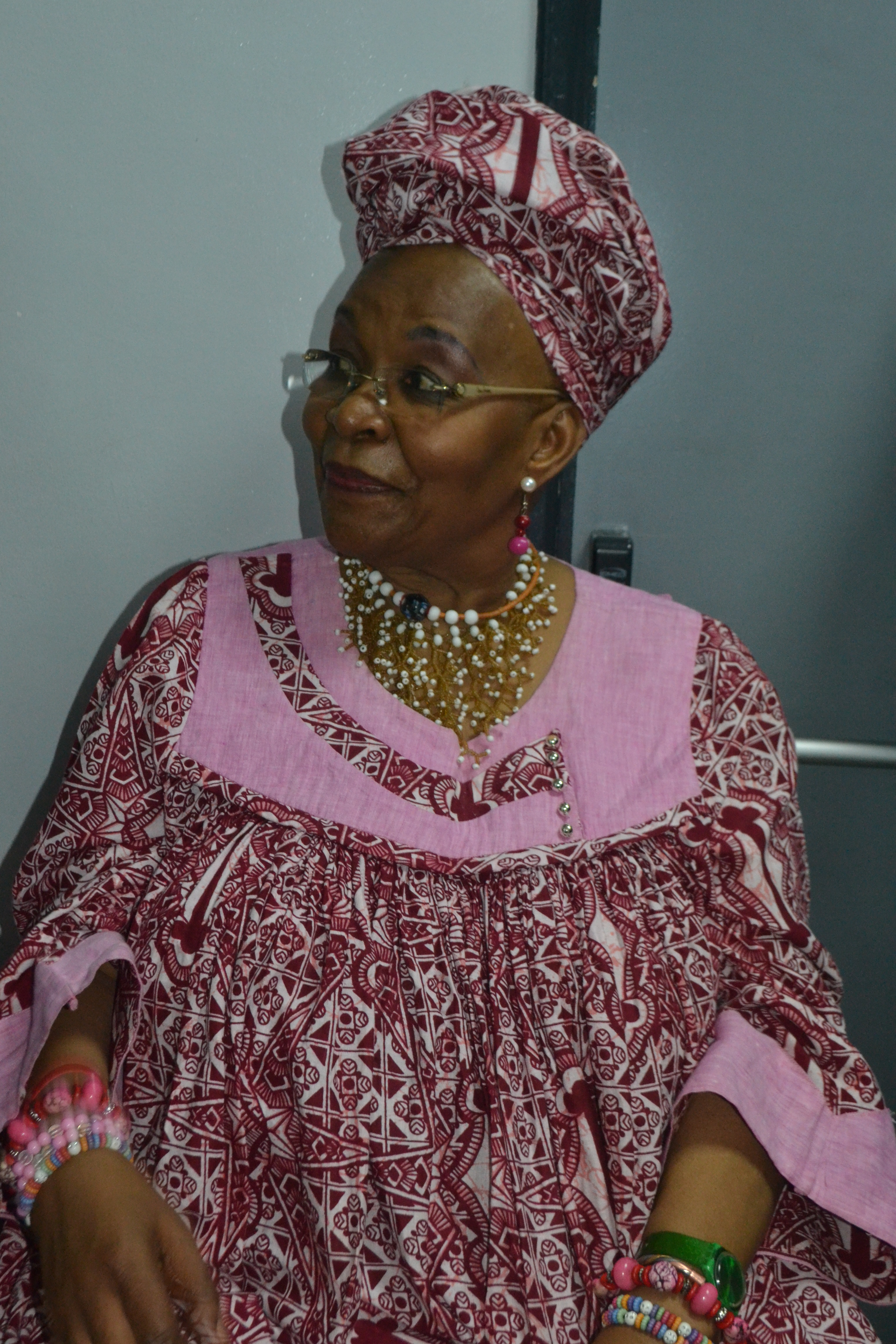 L'avocate camerouaise Me Alice Nkom